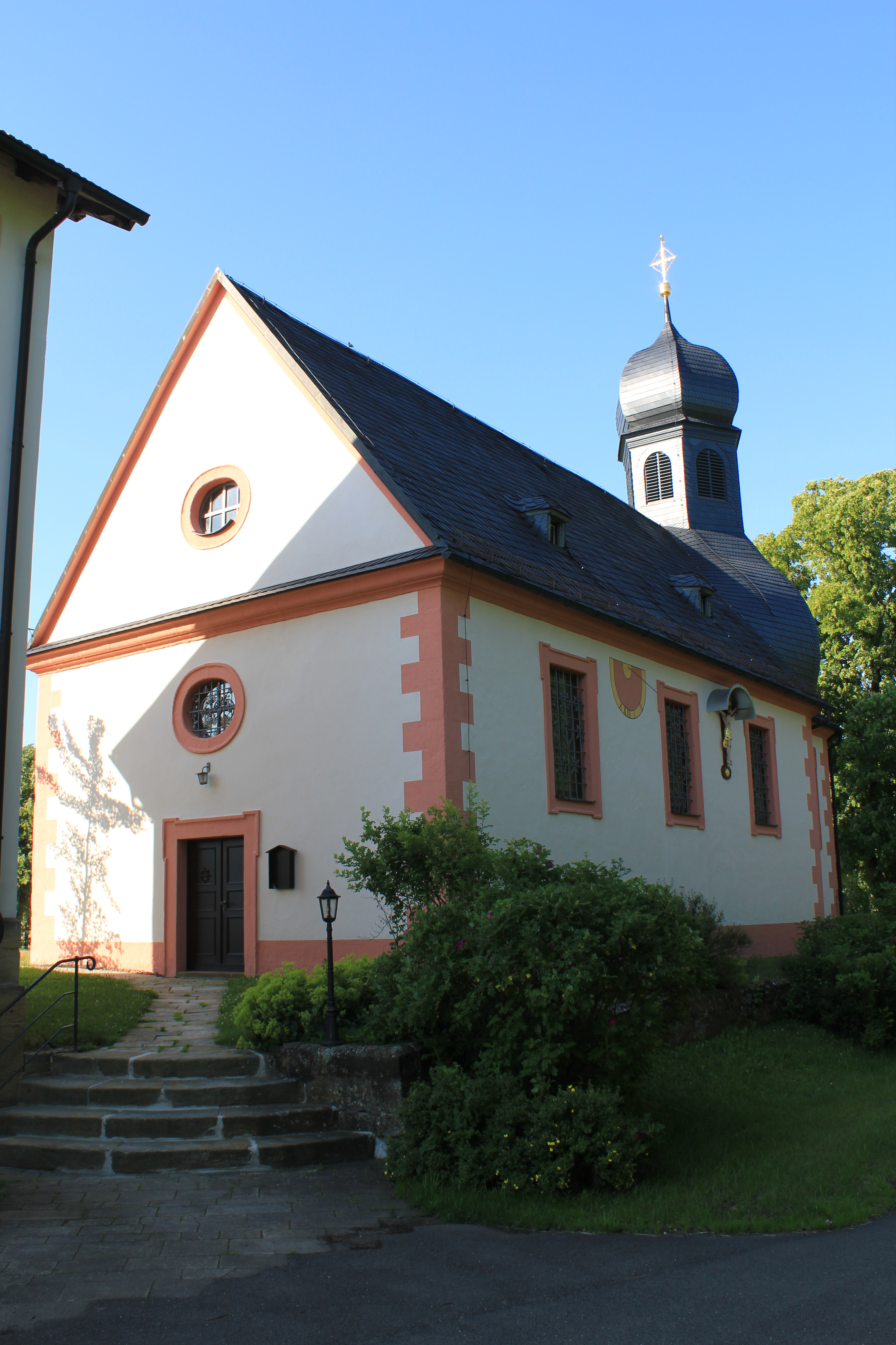 Südwestansicht der Kapelle St.-Georg in Pfaffendorf